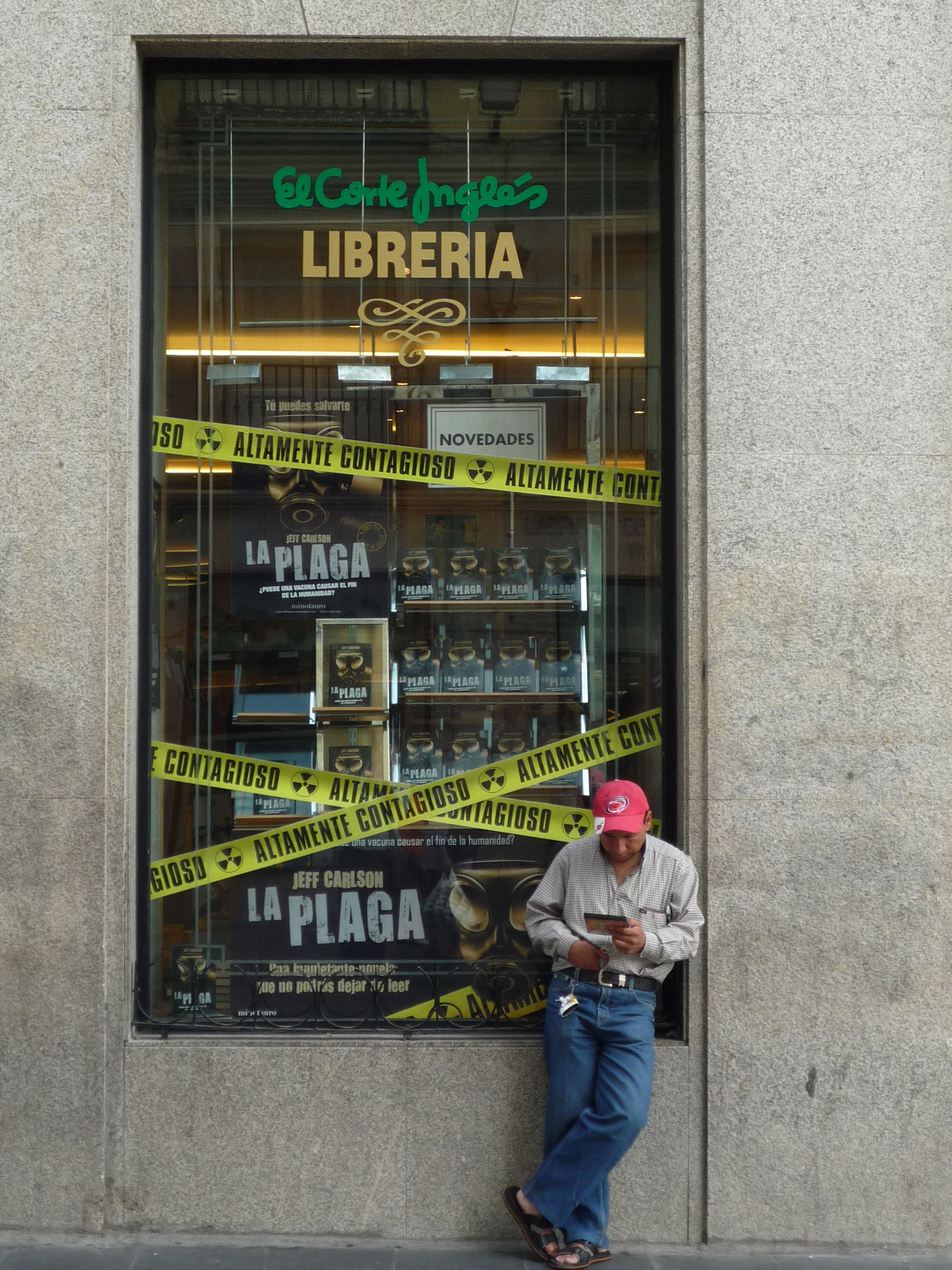 La Plaga